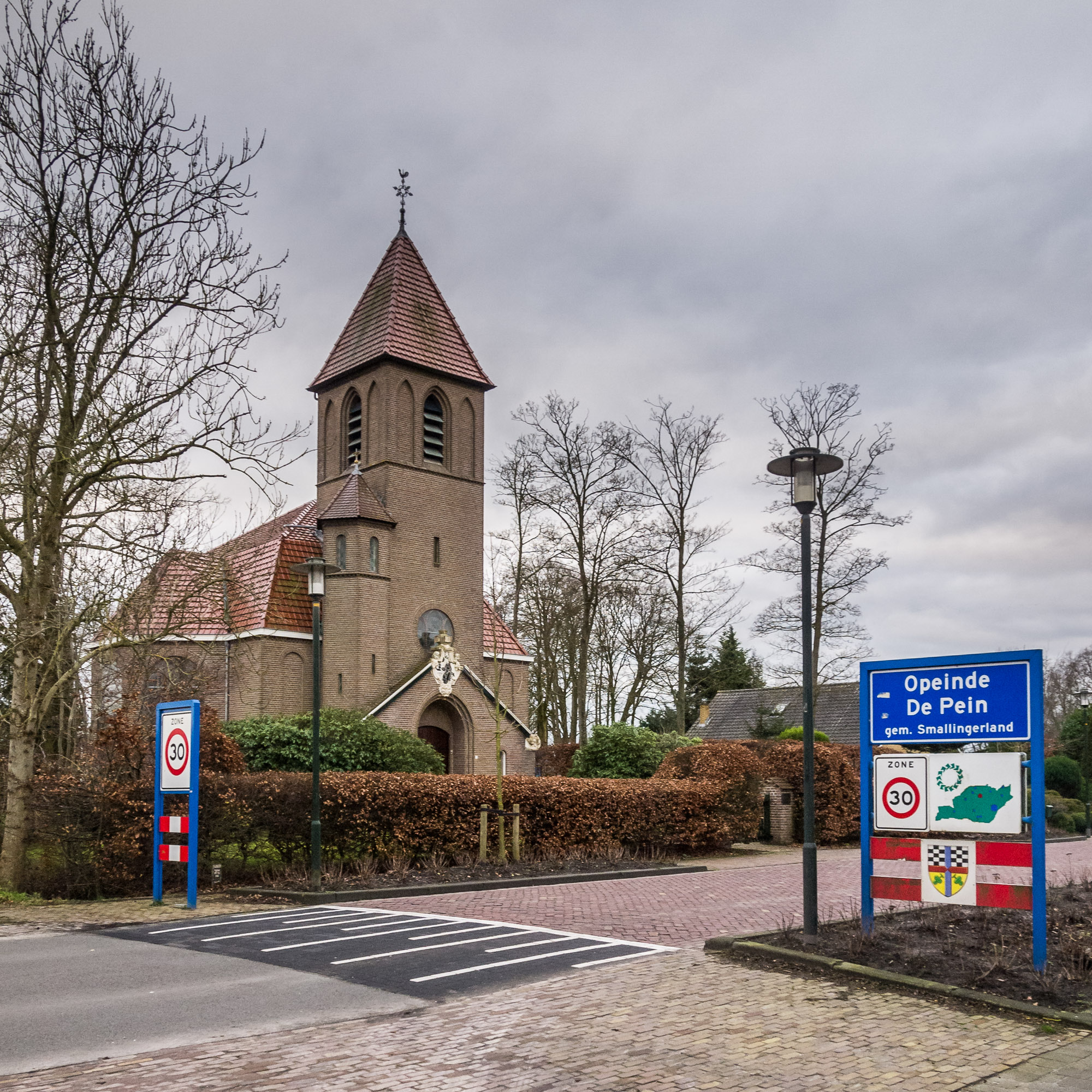 Hervormde kerk, Kommisjewei 25, Opeinde